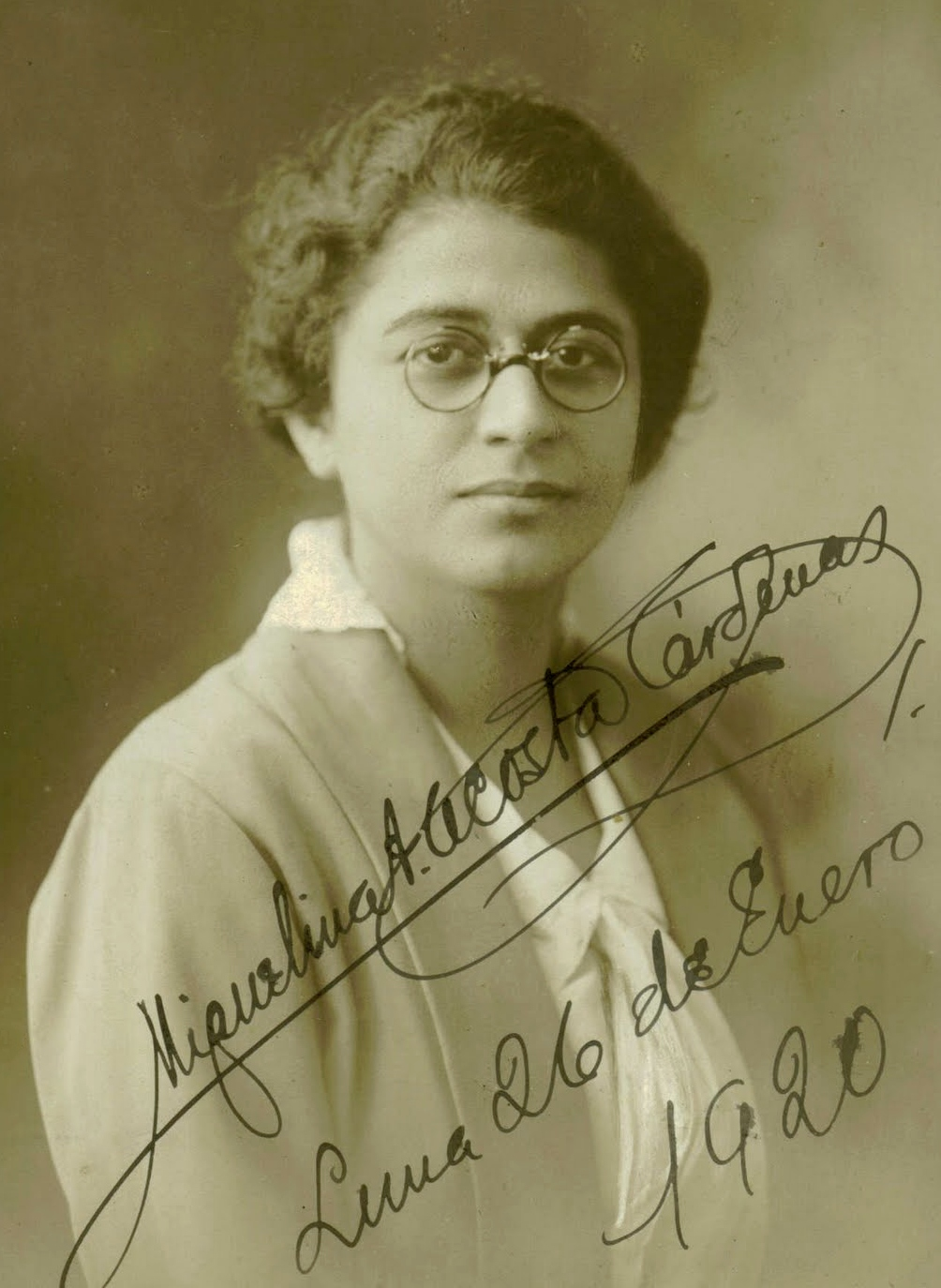 Miguelina Acosta Cardenas Lima 26 ene 1920